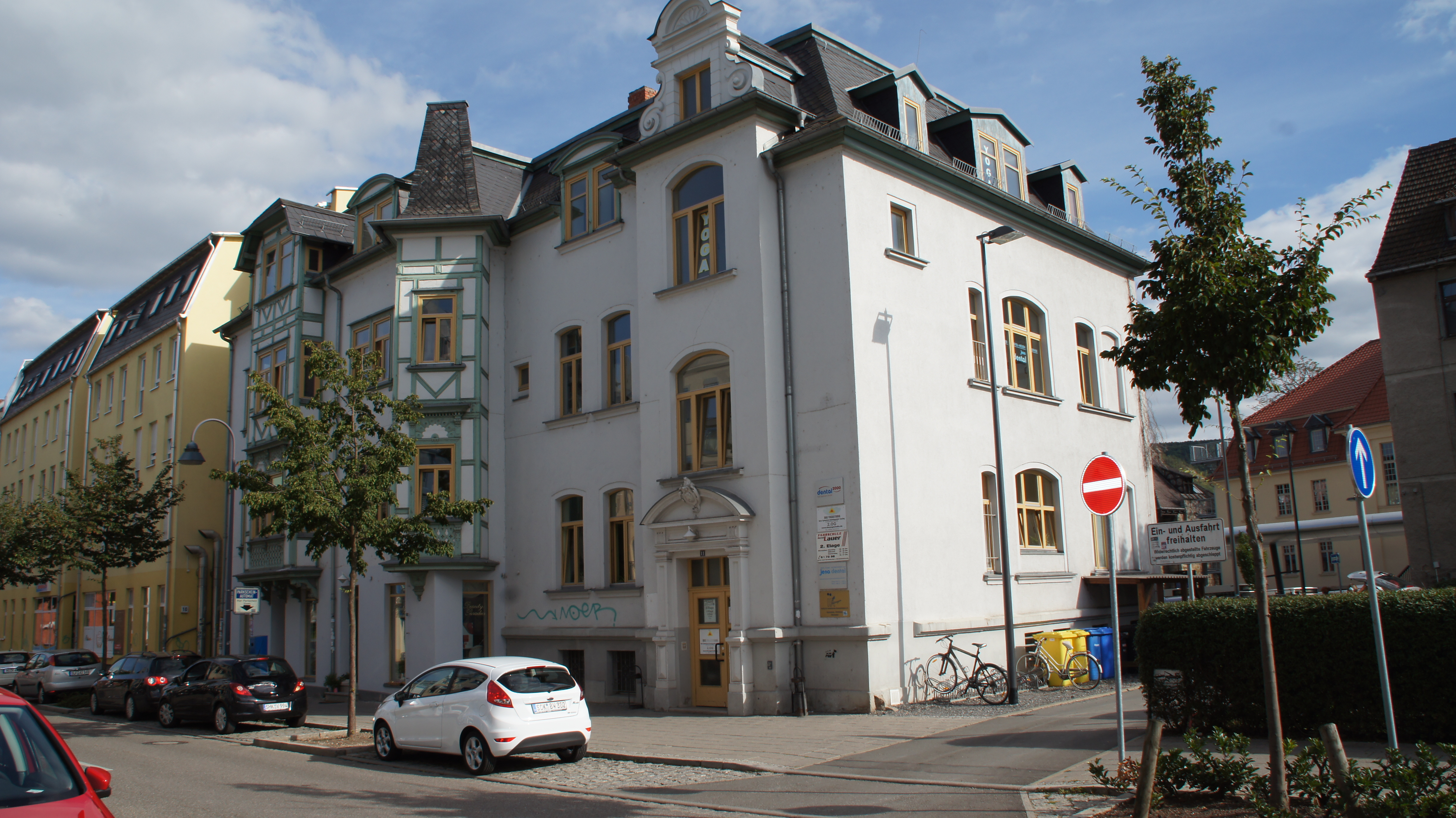 IIK - Standort Jena